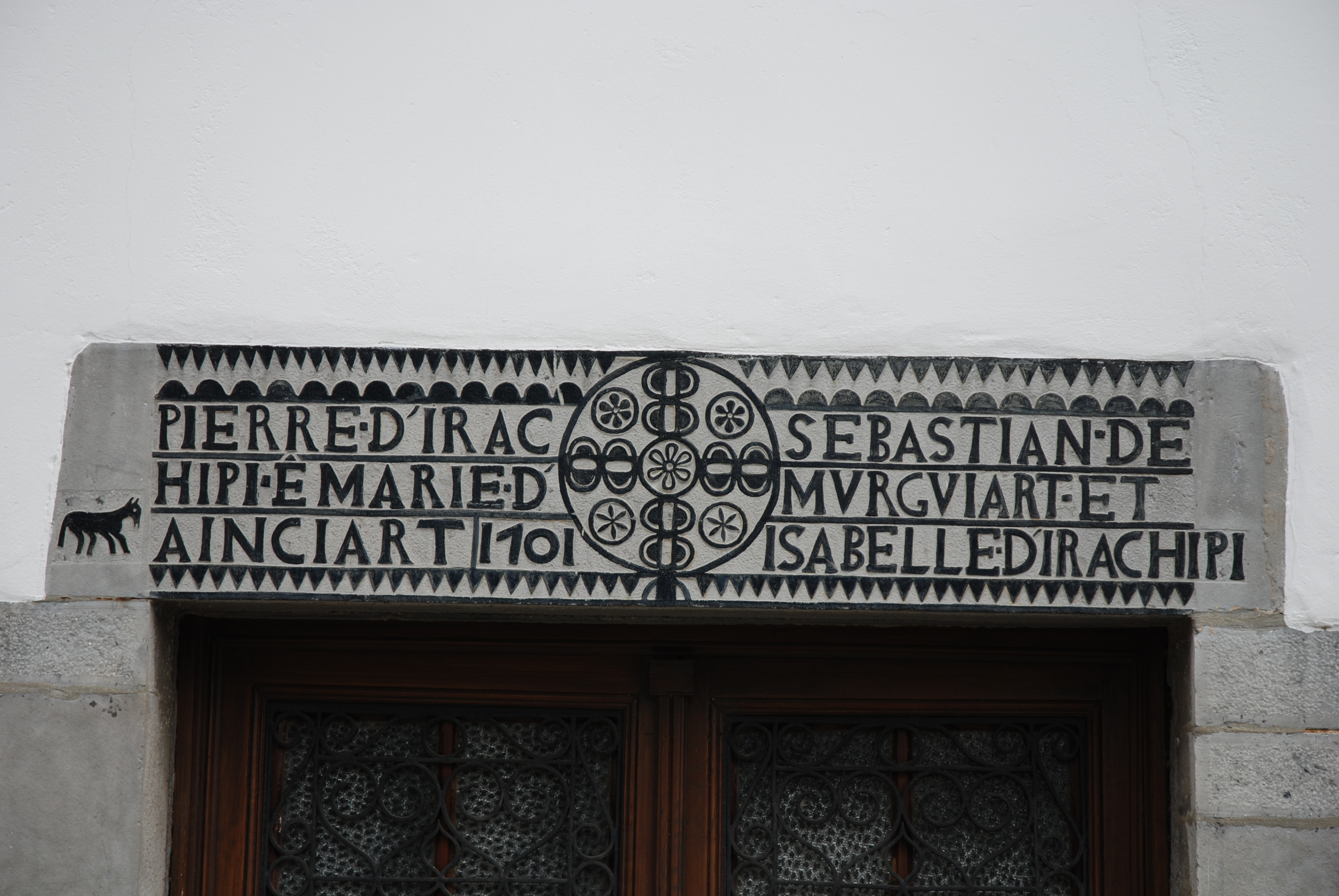 Iholdy, linteau sculpté